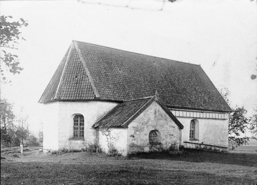 Kyrkan från nordöst. Kategori: (01) ExteriörerKyrkan från nordöst.